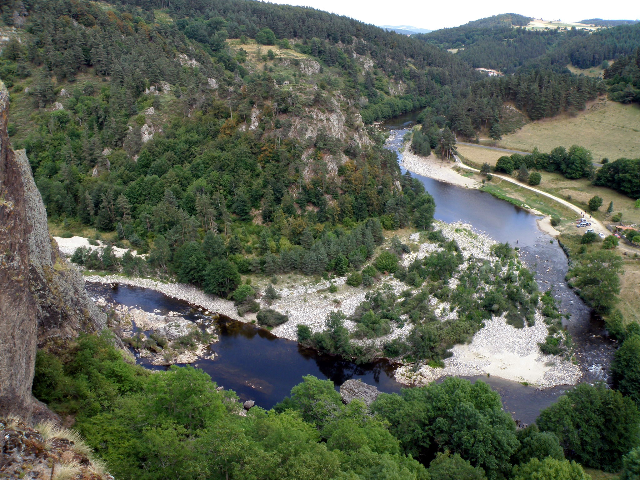 Arlempdes, comm. de la Haute-Loire, France (région Auvergne). La Loire vue depuis le château d'Arlempdes. Prise de vue vers l'est.